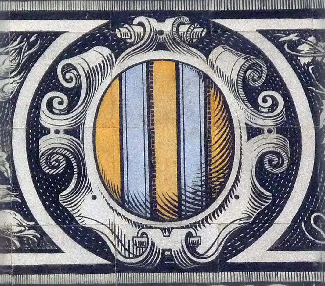 Fürstenzug in Dresden, Wappen der Mark Landsberg